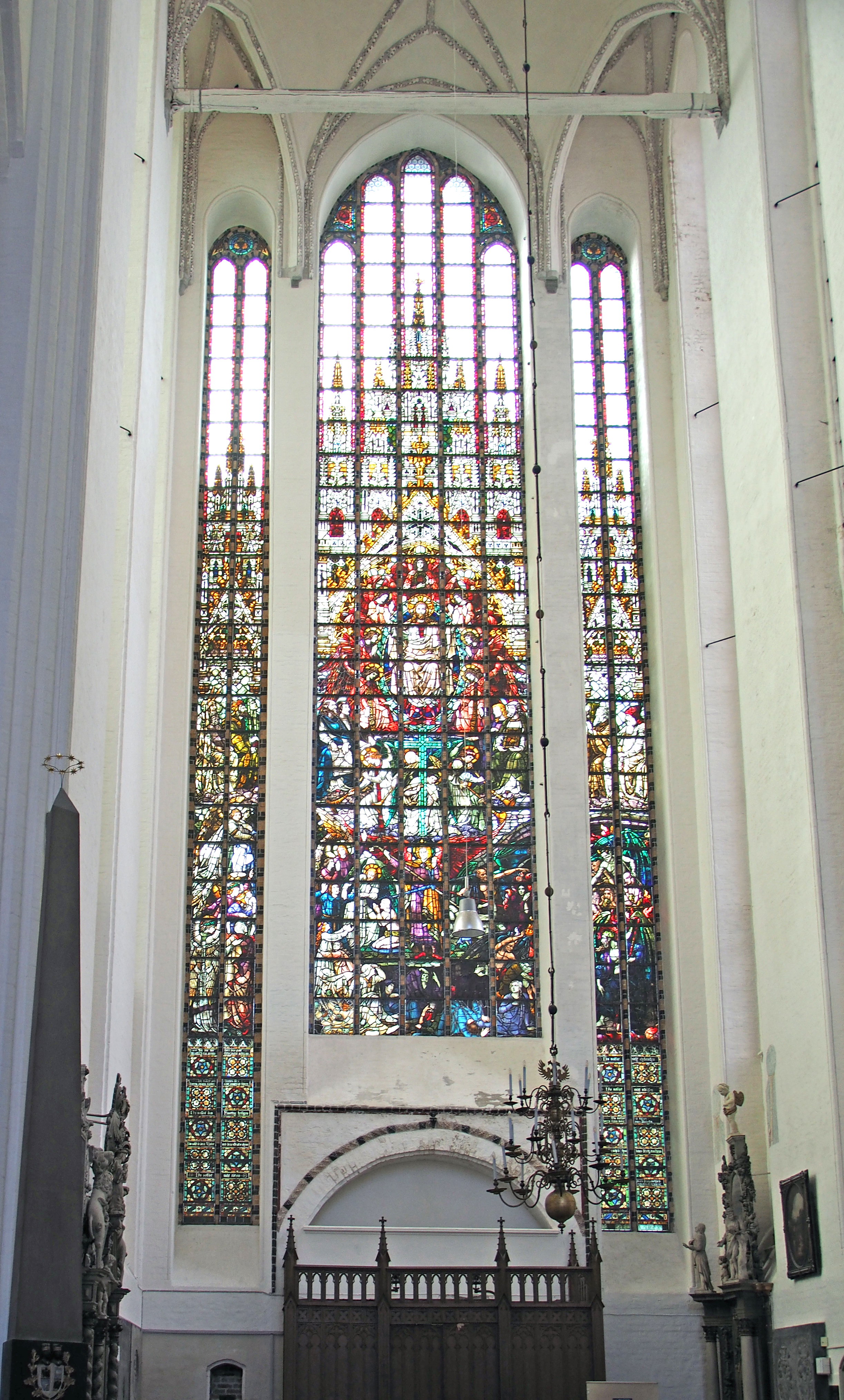 Glasmalereibild von 1904 im Südgiebel der Kirche, Höhe 26 m, mit „Christus als Weltenrichter“